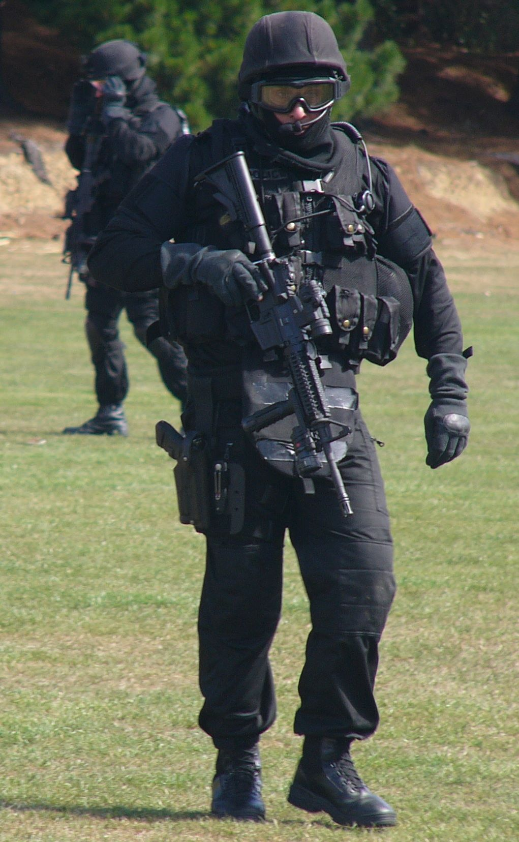 More Photos available at